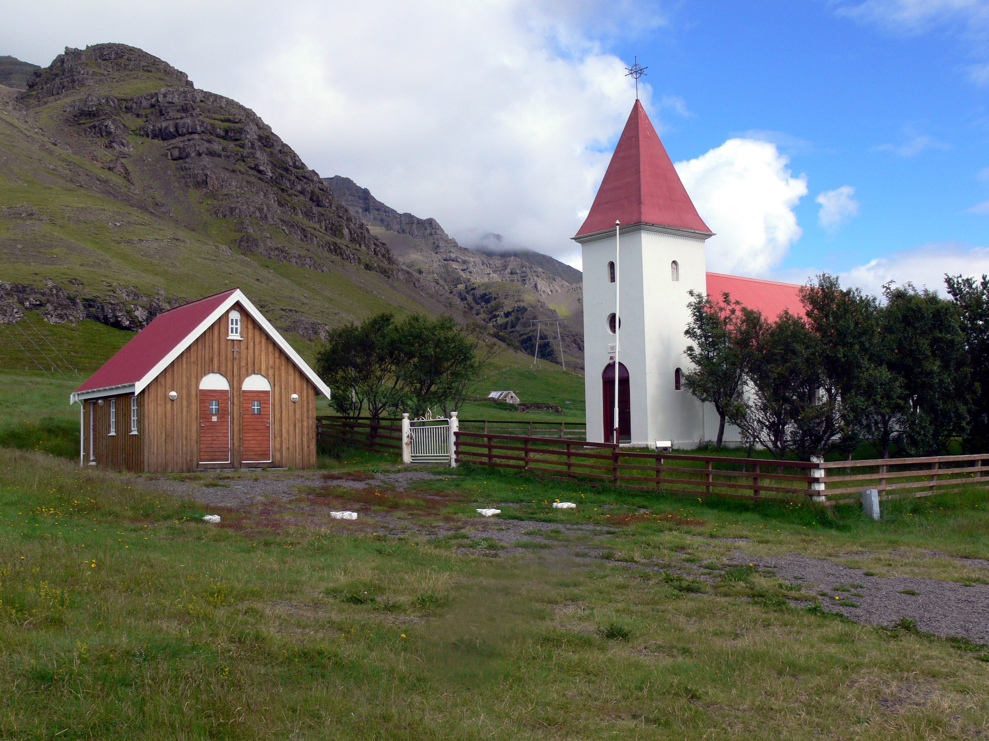 Kirche von Kálfafellsstaður in Suðursveit.